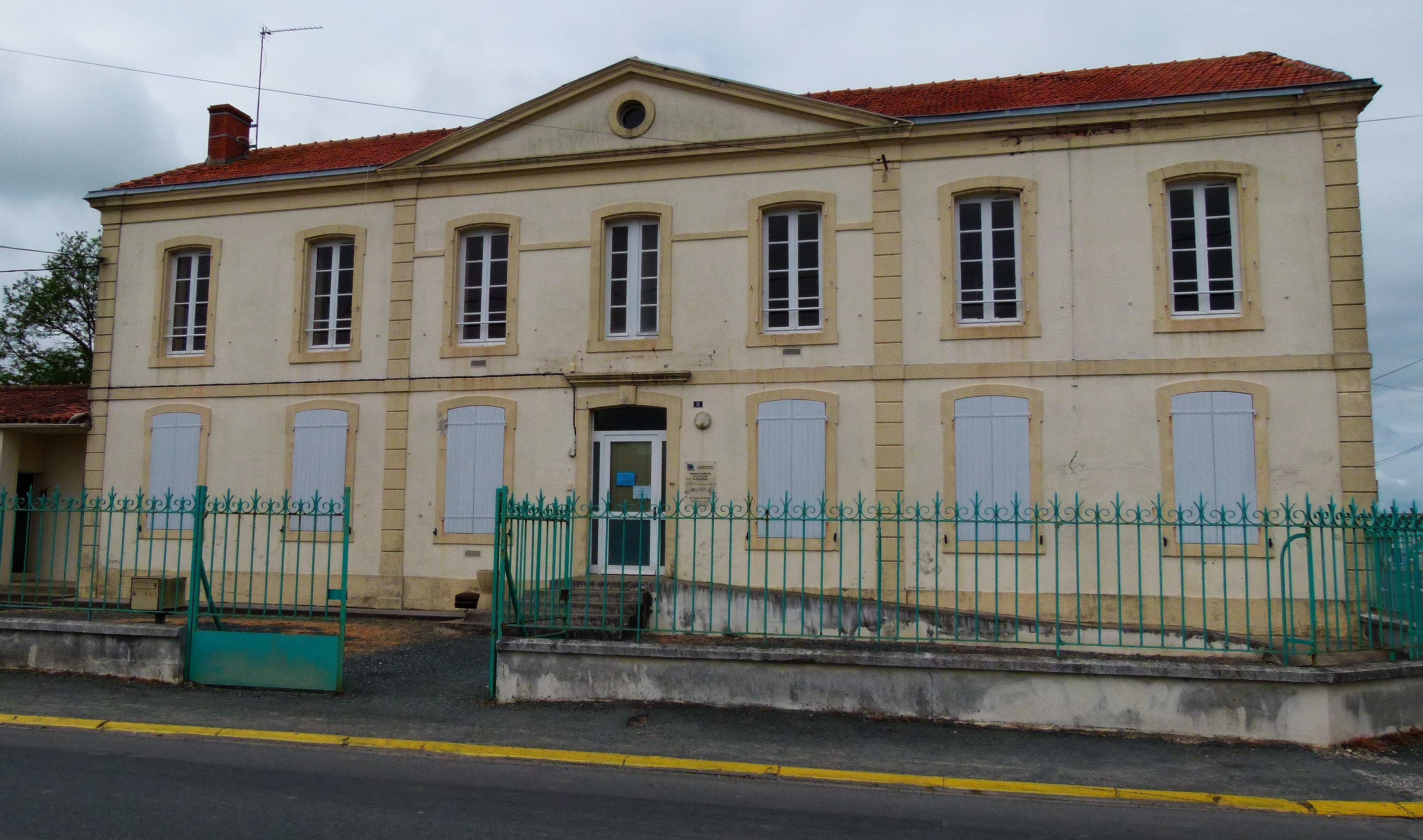 L'ancienne maréchaussée inaugurée en 1878 à Aigrefeulle d'Aunis